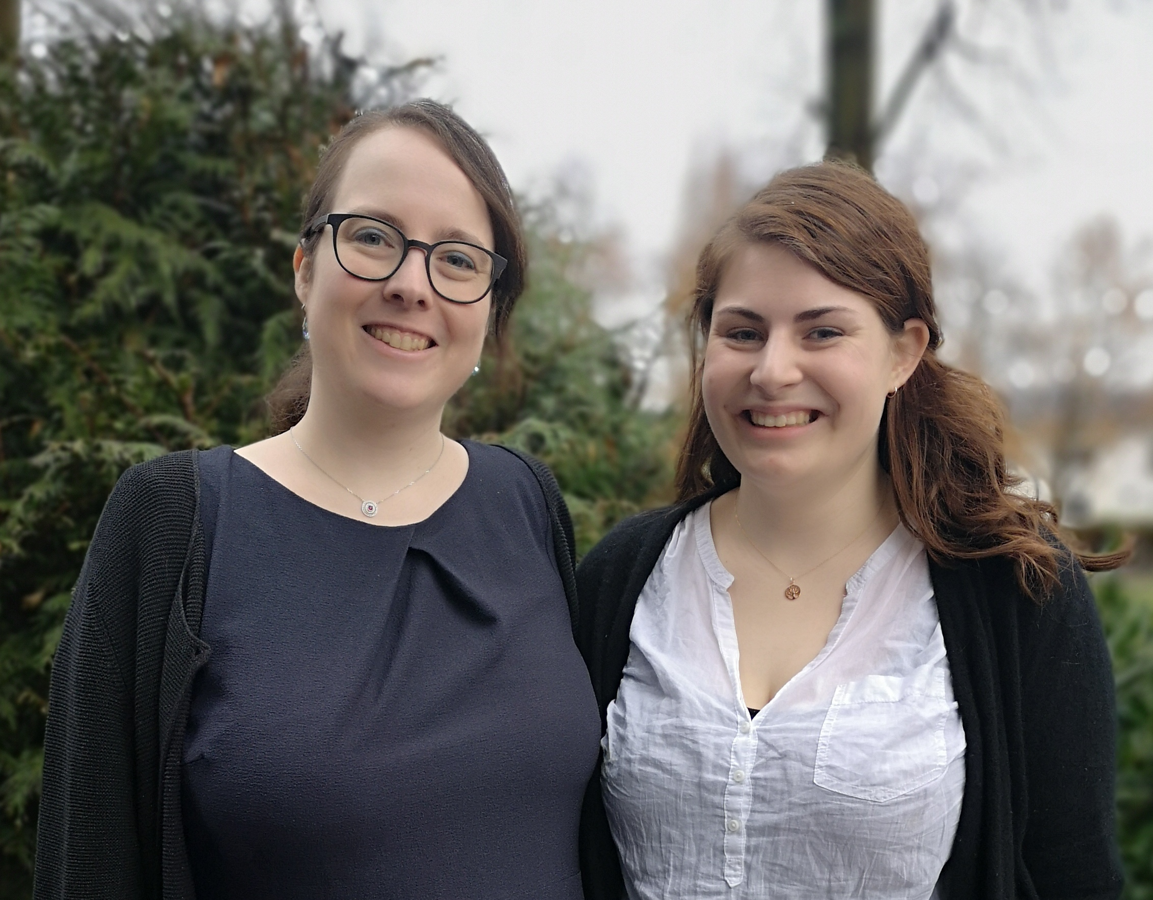 Miriam Lohrengel, Vorsitzende (links) und Fiona Paulus stellv. Vorsitzende (rechts)